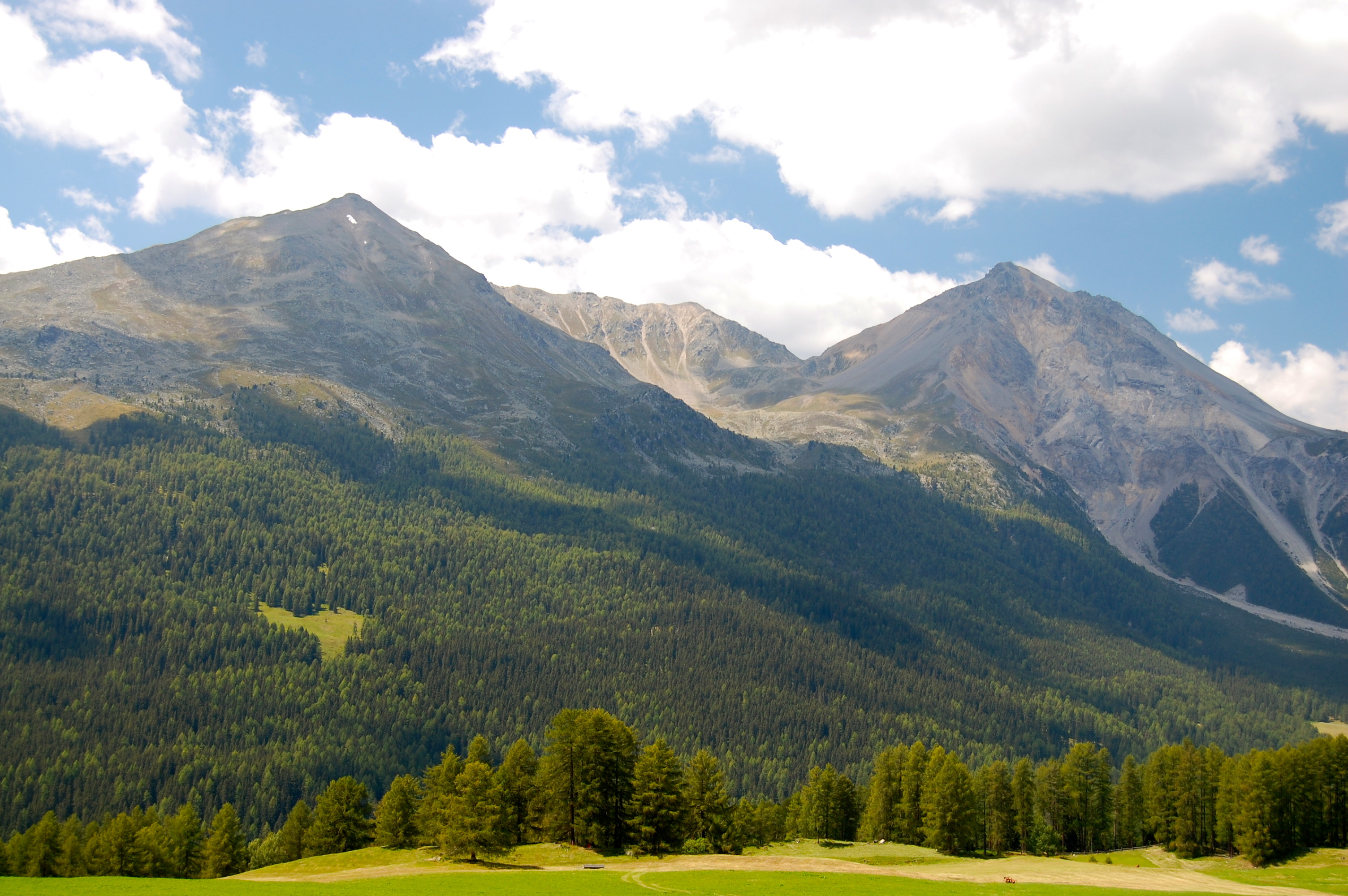 Piz Dora (links) und Piz Daint von Lü aus gesehen (Nordosten)